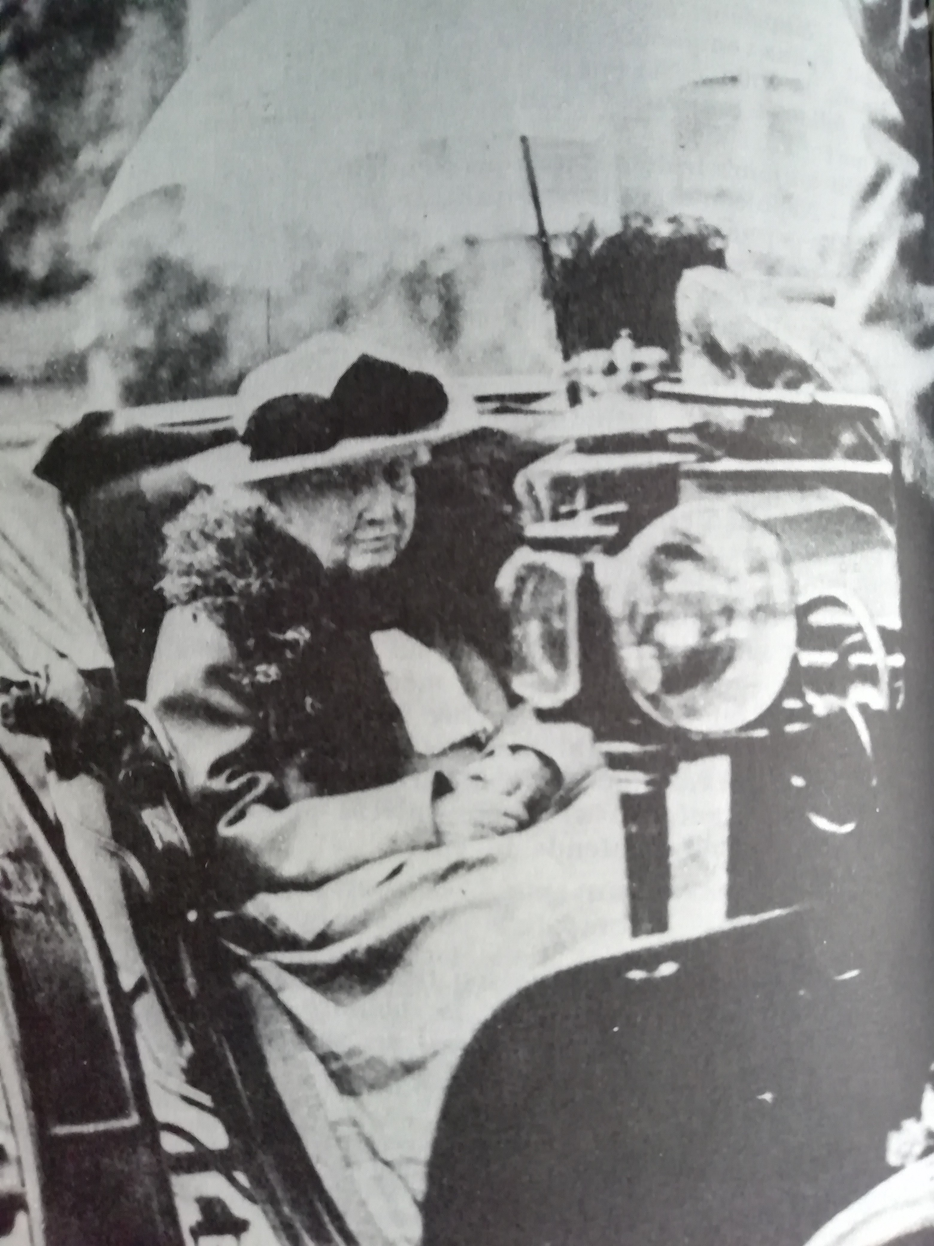 Dans une calèche, protégée par une ombrelle, l'impératrice Charlotte se promène dans le parc du domaine de Bouchout.